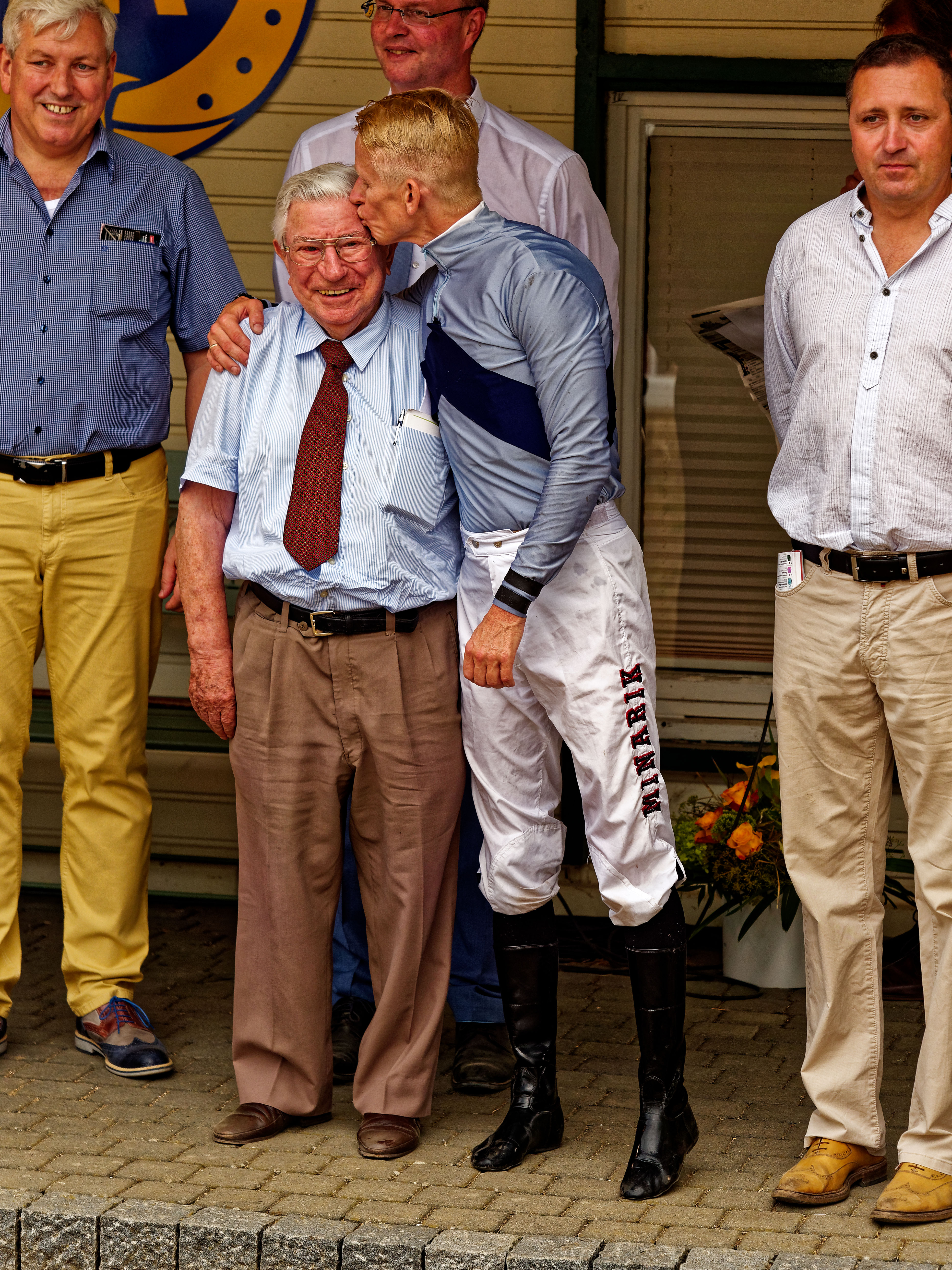 Hein Bollow (links) mit seinem Freund Filip Minarik (rechts) bei einer Siegerehrung in Bad Harzburg